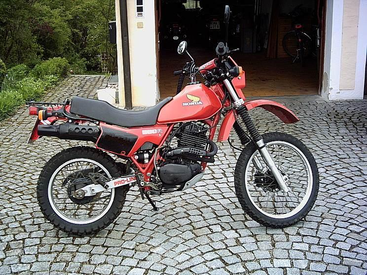 Honda XL 500 RC